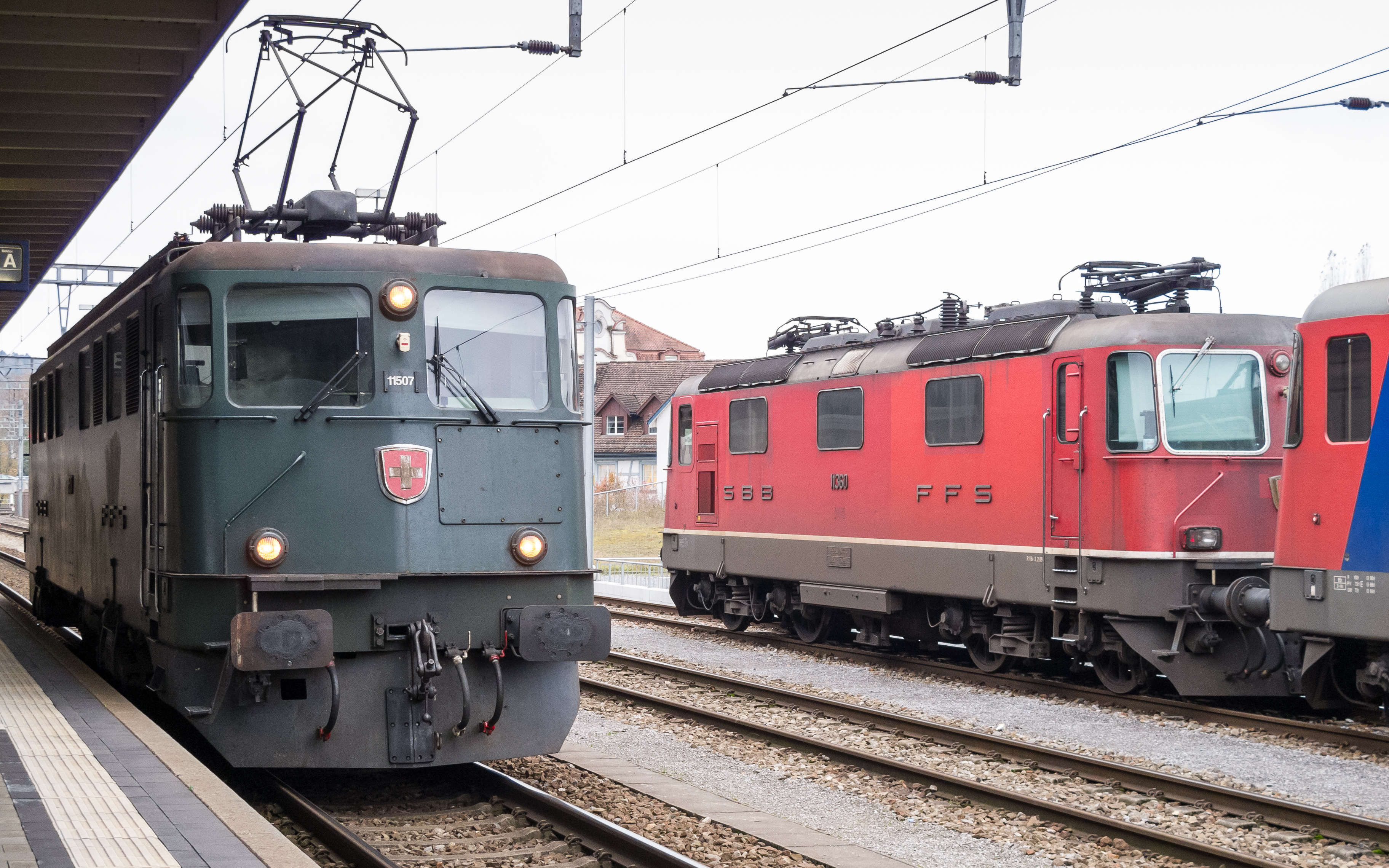 SBB Ae 6/6 Nr. 11507 und SBB Re 4/4 III Nr. 11360 in Frauenfeld (2012)